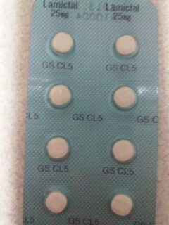 薬